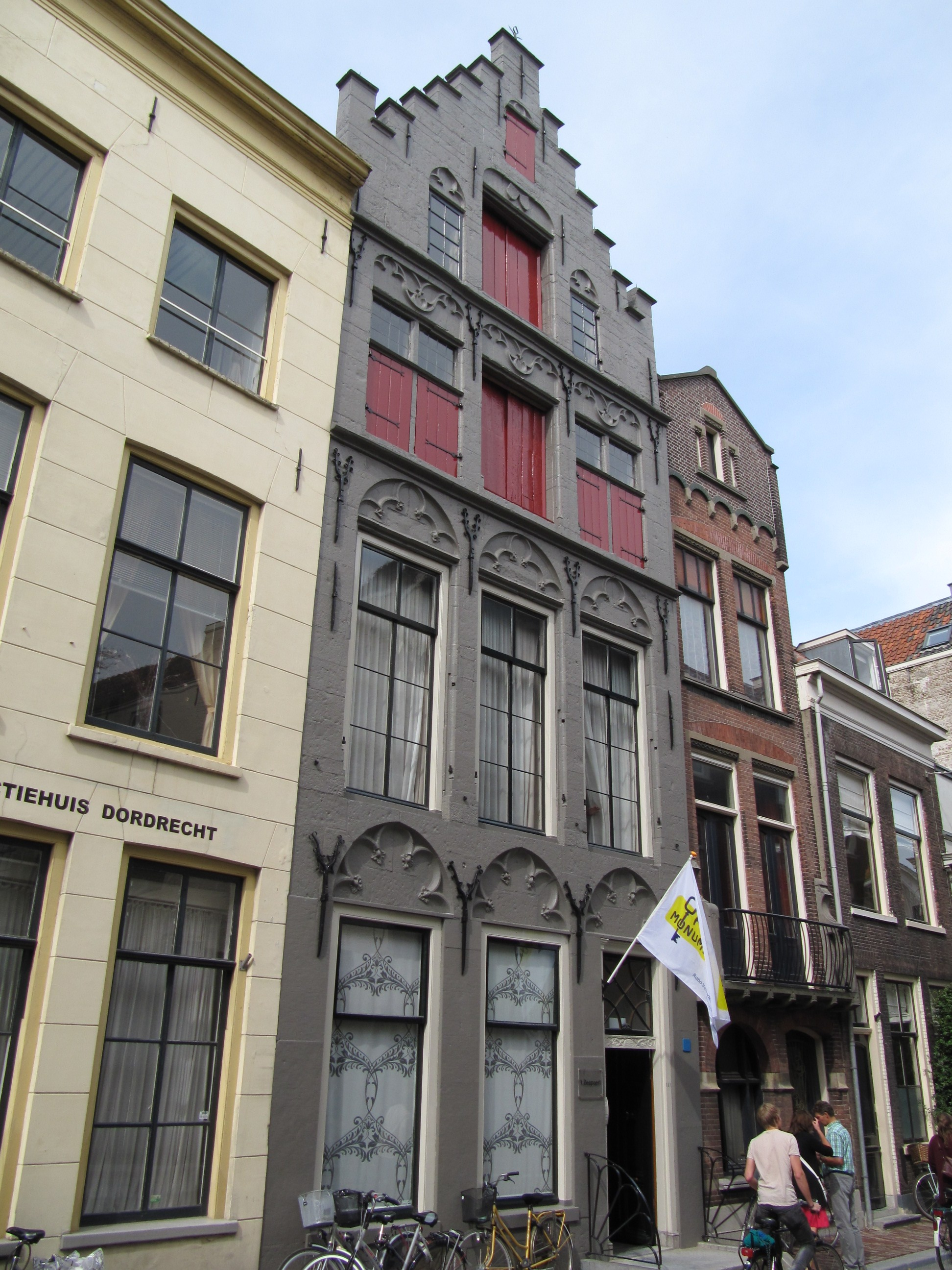 RM13996 Dordrecht - Wijnstraat 113.jpg